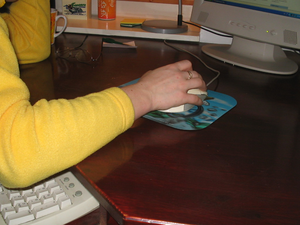 Iza aan het computeren